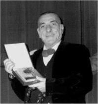 Biografia Archeoli Russo Giovanni